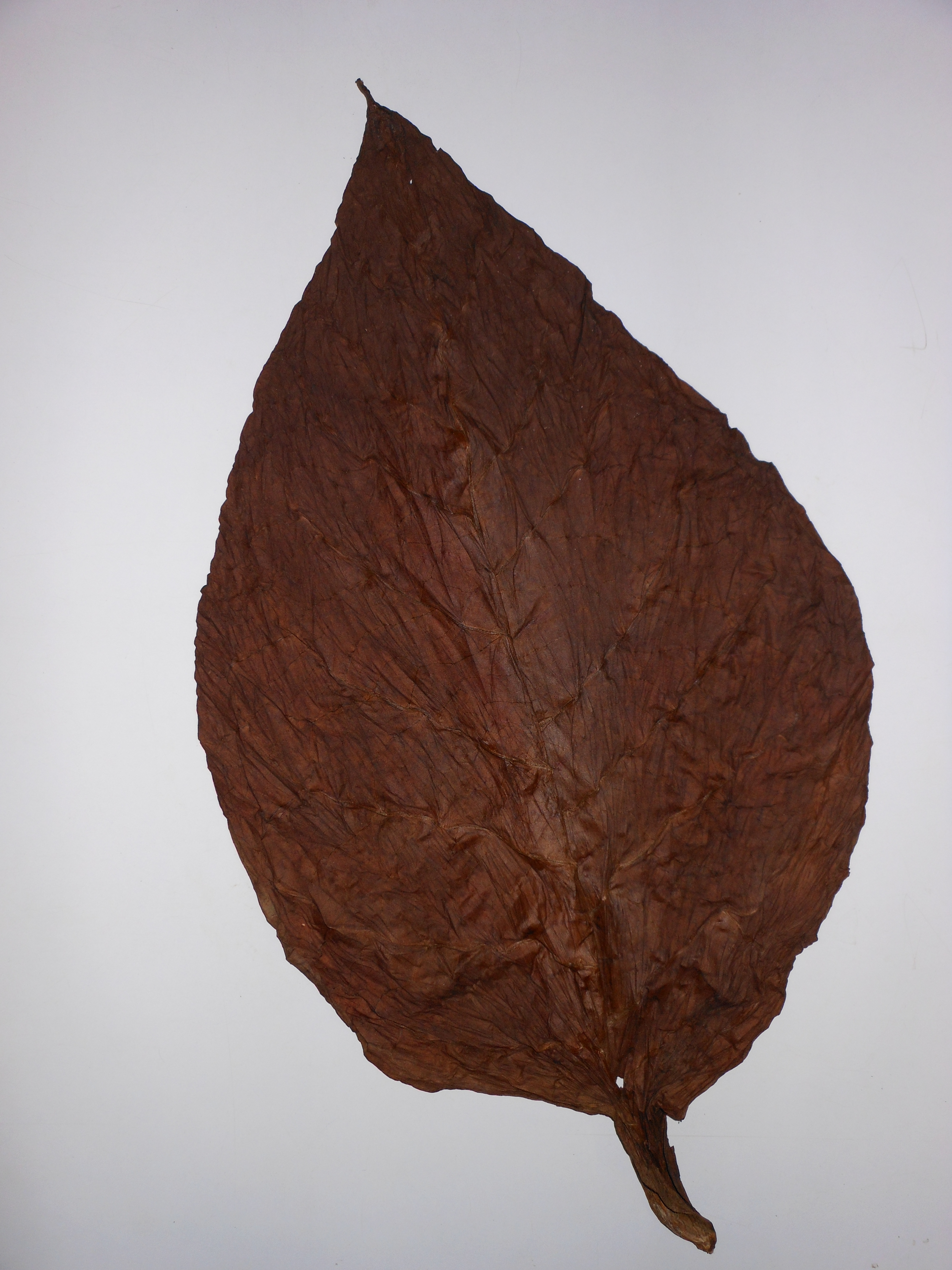 dfsdf asd